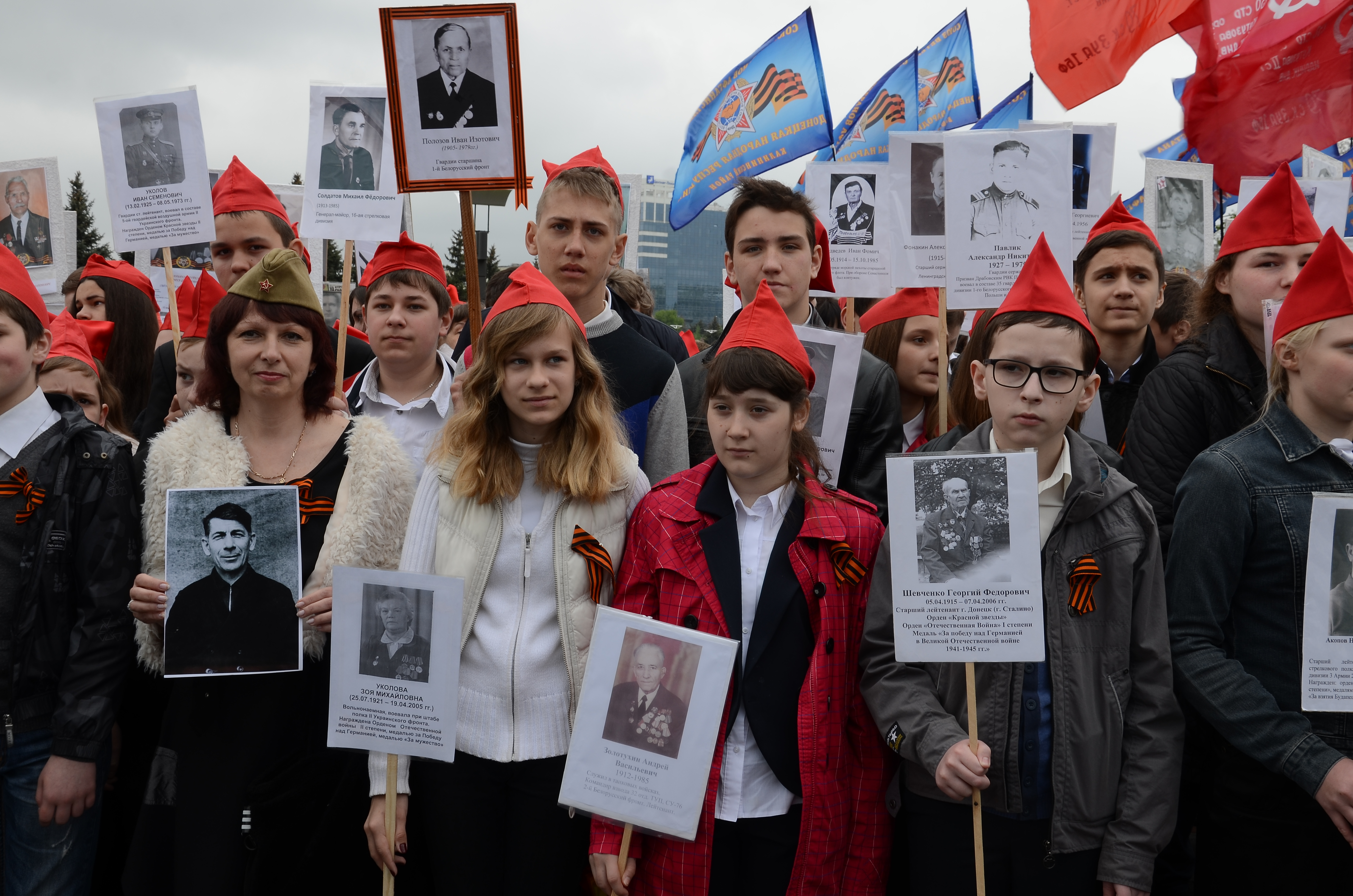 День Победы в Донецке